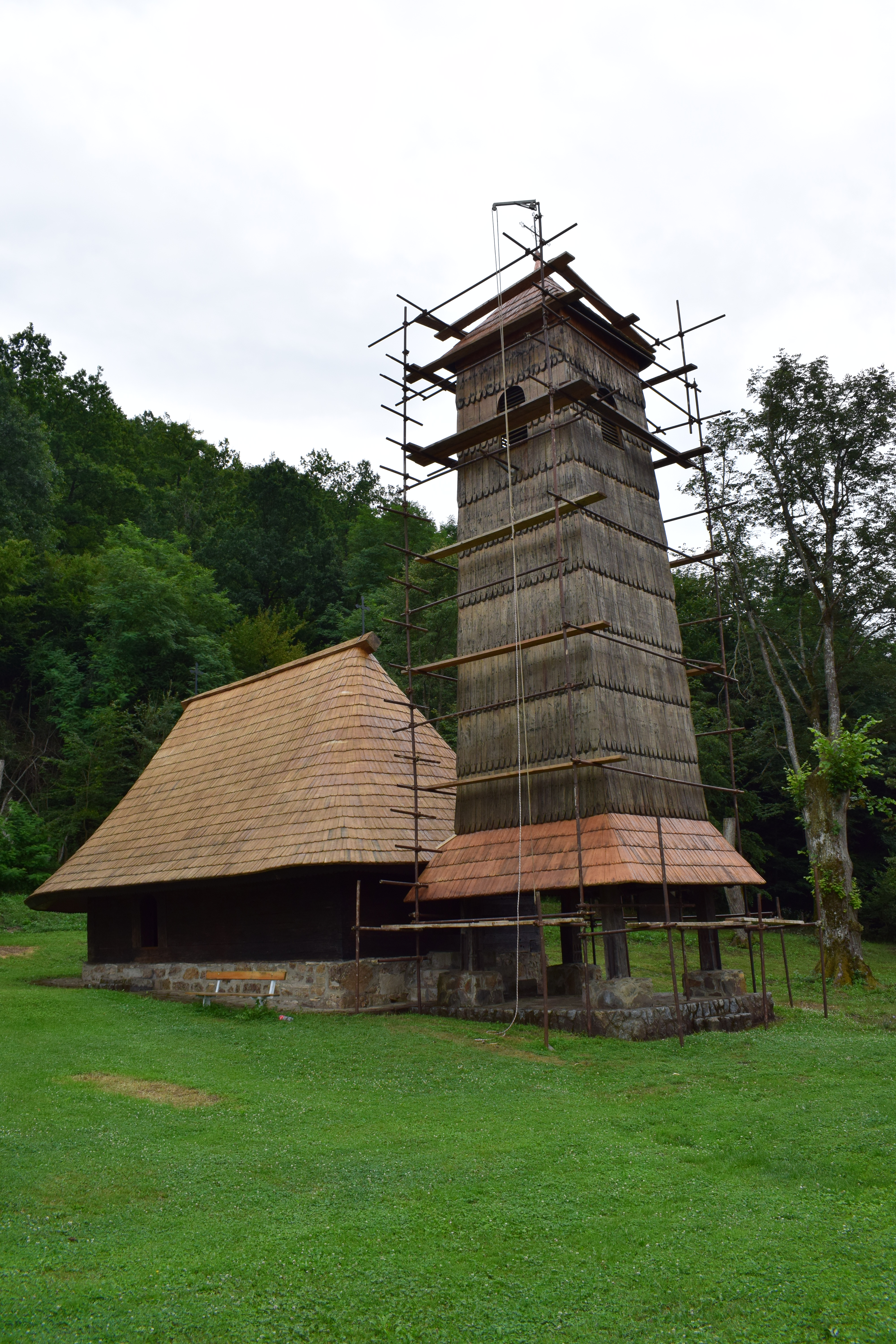 Црква брвнара у Јелићкој посвећена празнику Преноса моштију Светог Оца Николаја је црква брвнара подигнута на ободу простране равнице зване Тимар, у мјесту Јелићка, званом Липик које се налази између Бањалуке и Приједора. Удаљена је око тридестеак километара од Бањалуке. У Црквеном музеју у Сарајеву, на псалтиру старе српске штампе, сачуван је помен о попу Нинку из Тимара из 1699. године. 1742. године помињу се тимарски попови Лазо и Дамјан, а у једном требнику из манастира Гомионице, руског издања из времена царице Катарине Друге, на првим доњим окрајцима доњих листова исписано је: „Ово је књига - Требник - влсништво моје, попа Илије Даменовића. Тимар, 23. јули 1785.“ На корицама је касније записао гомионички калуђер: „Написа поп Гавро Стојнић, село Тимар“. У Јелићкој, односно Тимару, двије су породица давале свештенике и калуђере овој цркви и околини: Поповићи и Јелићи по којима је село и добило име. Кроз цијели 19. вијек, бројни су записи који спомињу свештенике у Јелићкој (поп Никола Јелић 1838. године, гомионички монаси Мелетије и Неофит 1816. године, поп Микајло Поповић 1764. и 1821. године и многи други записи из 18. и 19. вијека), што указује на чињеницу да је у том периоду црквени живот овог краја био врло интензиван. На основу података из црквених књига у Јелићкој и у манастиру Гомионици, може се претпоставити да је овај крај имао црквицу старију од садашње, која је вјероватно била изграђена од дрвета, јер нема помена ни записа ни о каквој зиданој цркви. Она се по предању налазила на лијевој обали Гомионице на мјесту званом Кућиштина. Црква је личила на обичну кућу, нешто сличну цркви у Малом Блашком. Приповиједа се како је пресељена у Липик, у густу шуму, за једну ноћ, дио по дио је ишао с руке на руку, па је разглашено да је црква сама промијенила своје мјесто. Међутим, црква је брзо оронула и пала.